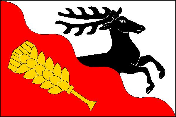 Vlajka obce Česká Čermná